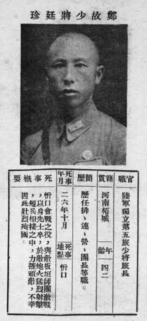 抗戰軍人忠烈錄第一輯中的烈士遺像